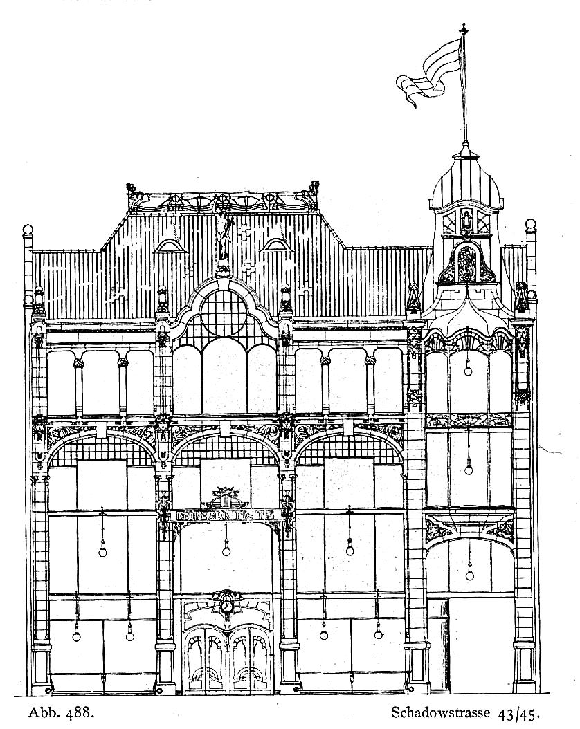 “Das Warenhaus Schadowstrasse Nr. 43–45 der Firma L. Tietz, im Geschäftsmittelpunkte gelegen und zugleich die grösste Anlage dieser Art in Düsseldorf, wurde im Jahre 1899 durch den Architekten Fritz Hofmeister erbaut. Die Galeriegeschosse gruppieren sich in typischer Weise um den die Mitte der Anlage einnehmen den stattlichen Lichthof mit der eindrucksvollen Aufgangstreppe. Die Durchfahrt zur Klosterstrasse (zum Kontor gebäude) ist durch Anbringung von Schaukästen ausgenutzt. In dem durchaus massiv und feuersicher ausgeführten Gebäude dienen abgesonderte Nottreppen, Nottüren und Feuerbalkone in ausreichenderAnzahl und zweckentsprechender Lage zur Rettung bei Feuersgefahr.Die monumentale Fassade aus Sandstein zeigt bei mächtigen, mehrere Geschosse um fassenden Schaufensteröffnungen moderne Formen mit Anlehnung an historische Bauweisen. Die Baukosten betrugen einschliesslich Zentralheizung, elektrischer Lichtanlage, Fahrstühle und sonstiger Nebenanlagen insgesamt 460000 M oder für das Kubikmeter umbauten Raums 18,50 M.”